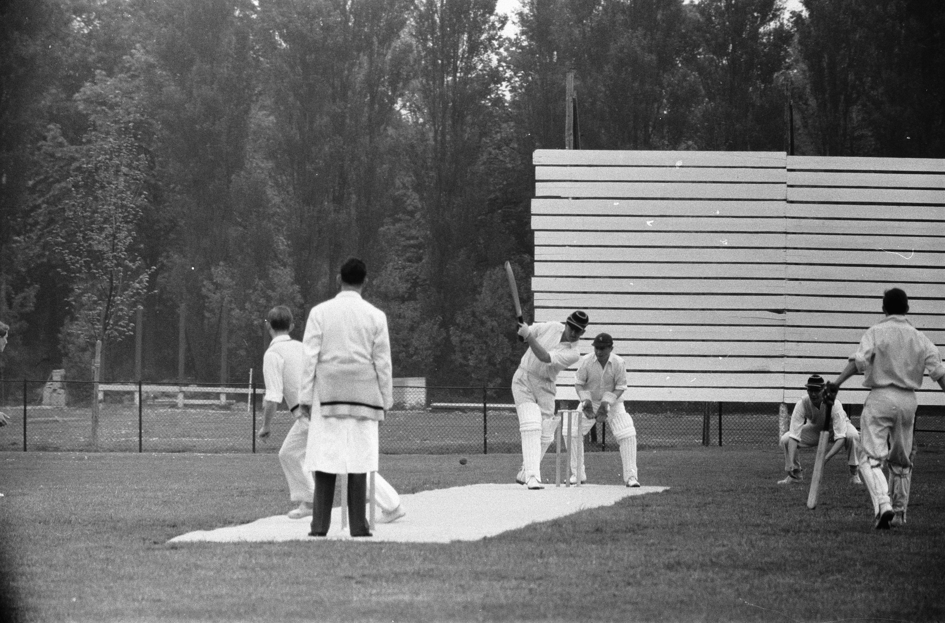 Collectie / Archief : Fotocollectie Anefo Reportage / Serie : [ onbekend ] Beschrijving : Cricket HCC II tegen Rood en Wit Datum : 15 mei 1960 Trefwoorden : CRICKET Persoonsnaam : HCC II Fotograaf : Pot, Harry / Anefo Auteursrechthebbende : Nationaal Archief Materiaalsoort : Negatief (zwart/wit) Nummer archiefinventaris : bekijk toegang 2.24.01.05 Bestanddeelnummer : 911-2570